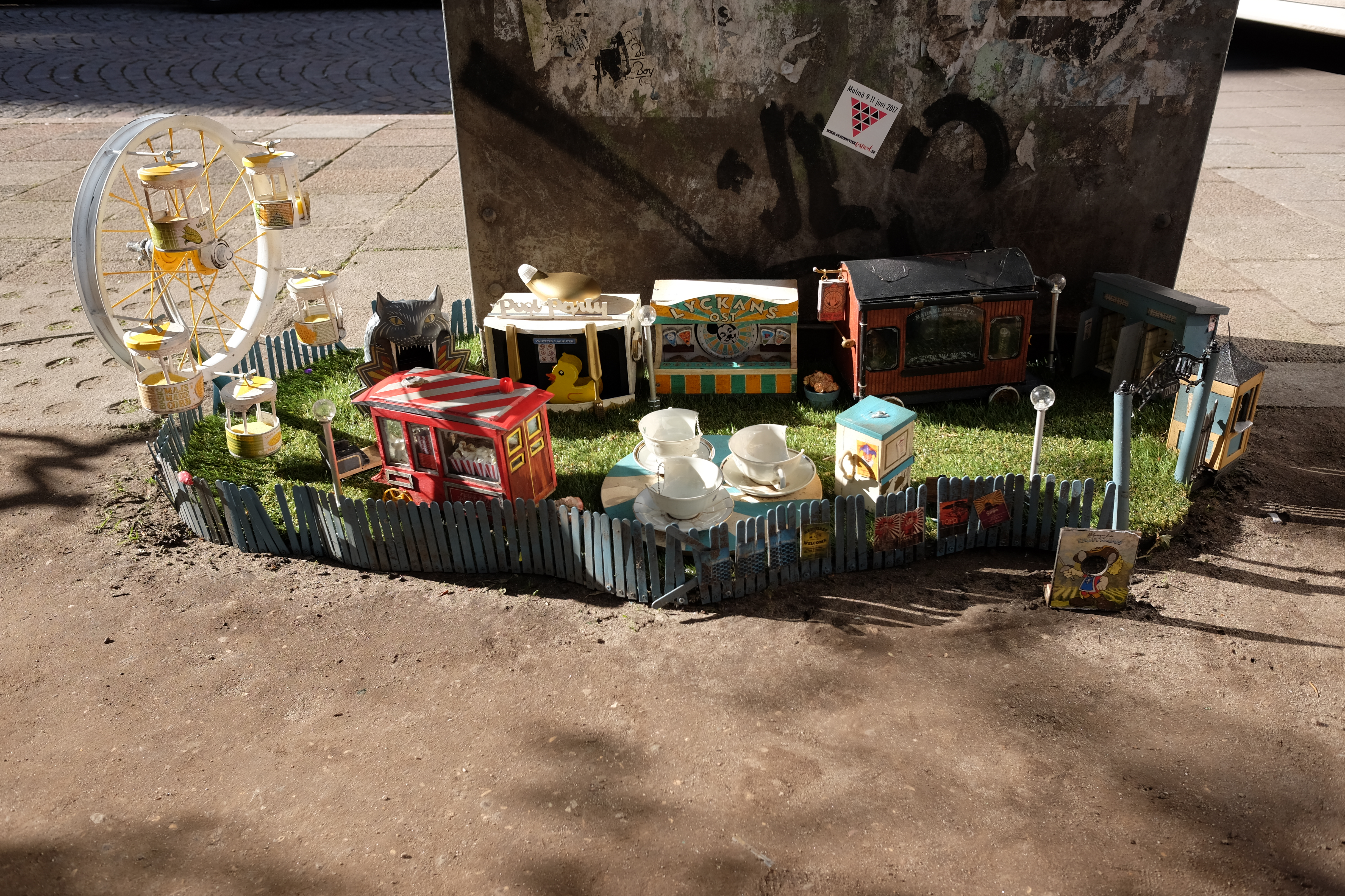 Anonymouses mustivoli på Södra Förstadsgatan i Malmö våren 2017.